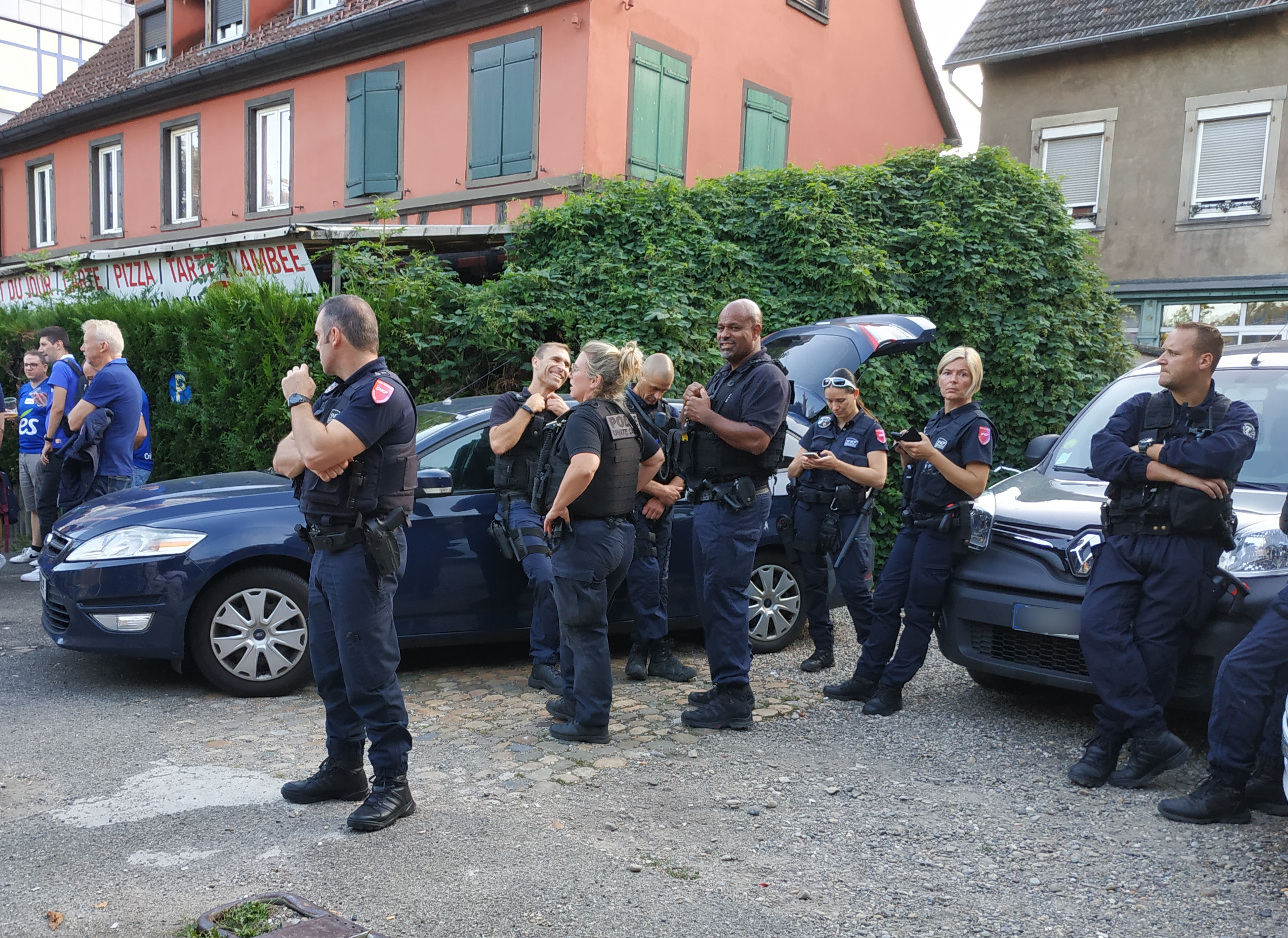 Police ferroviaire et unité cynophile de la police nationale, lors du match Racing-Eintracht Francfort à Strasbourg (22 août 2019)